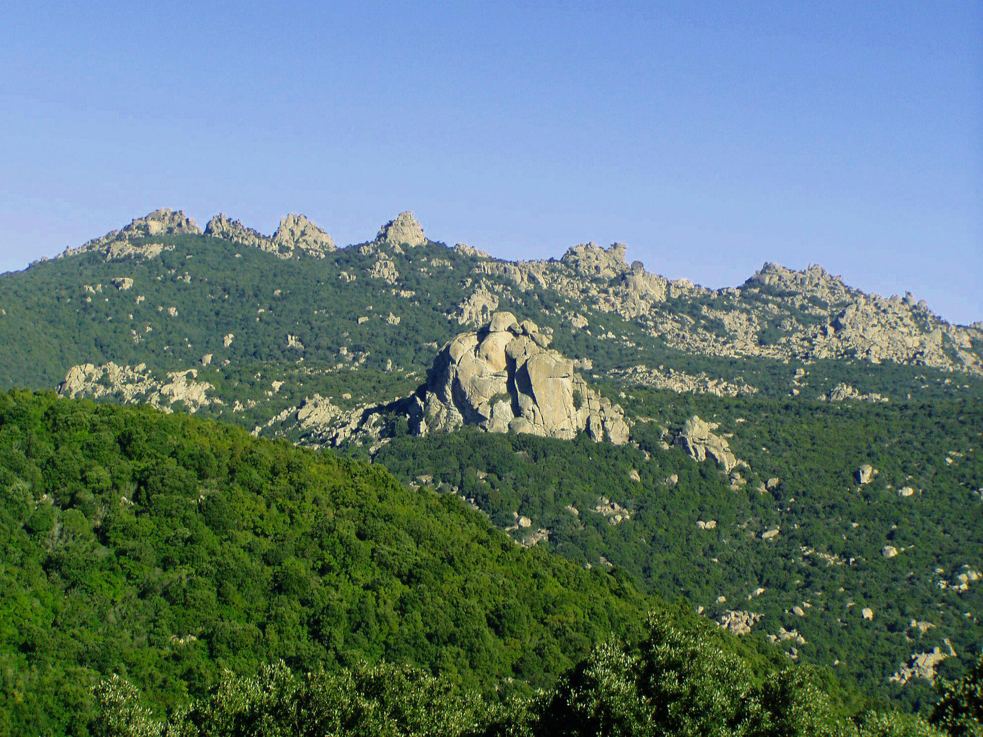 Le cime dei Sette Fratelli